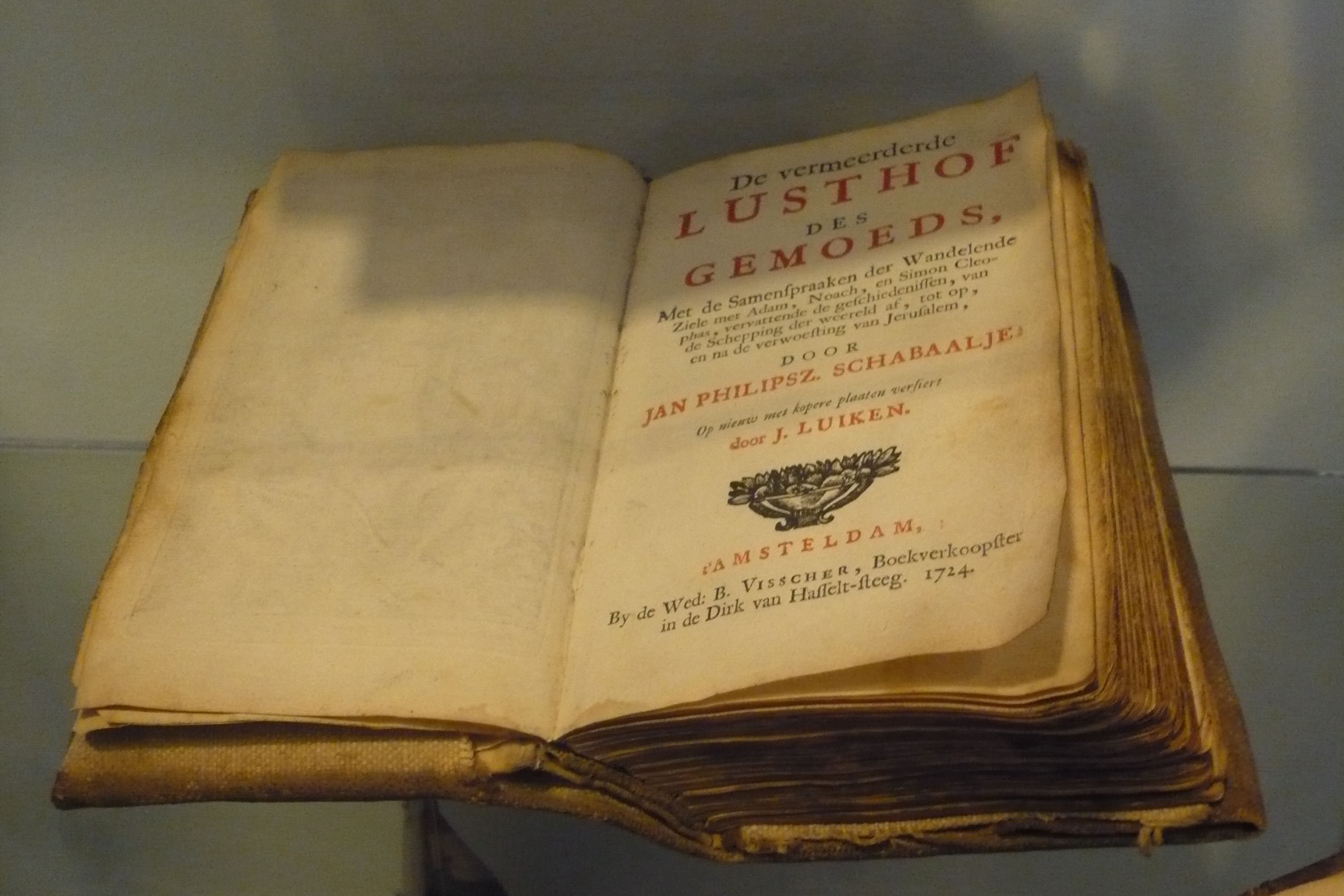 IJmuider Zee- en Havenmuseum 'de Visserijschool', Havenkade 55, IJmuiden Lusthof des Gemoeds - Jan Philipsz Schabaalje 1714